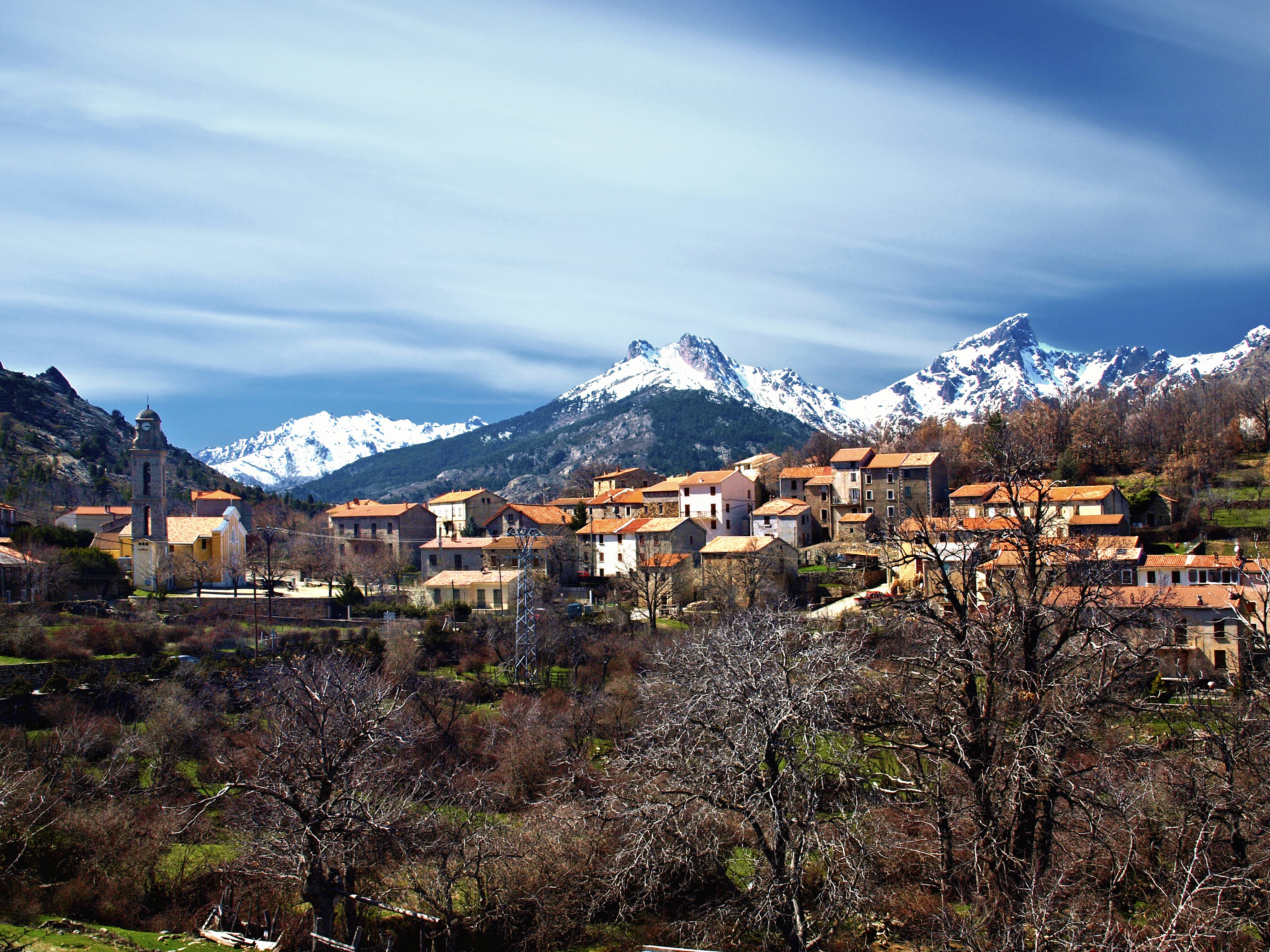 Casamaccioli (Corsica) - Vue du village et de la Paglia Orba